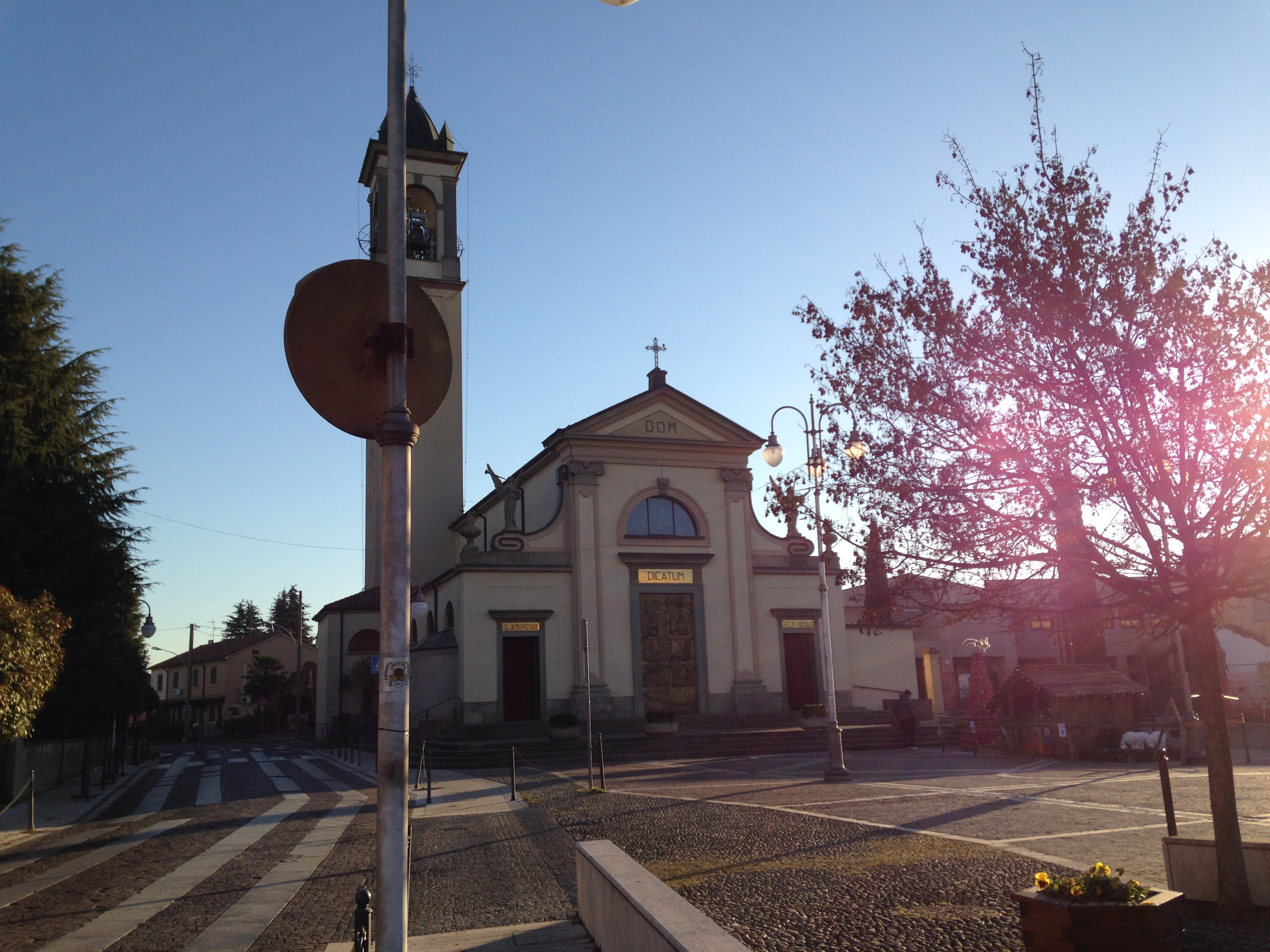 La chiesa parrocchiale di Roncello nel 2015